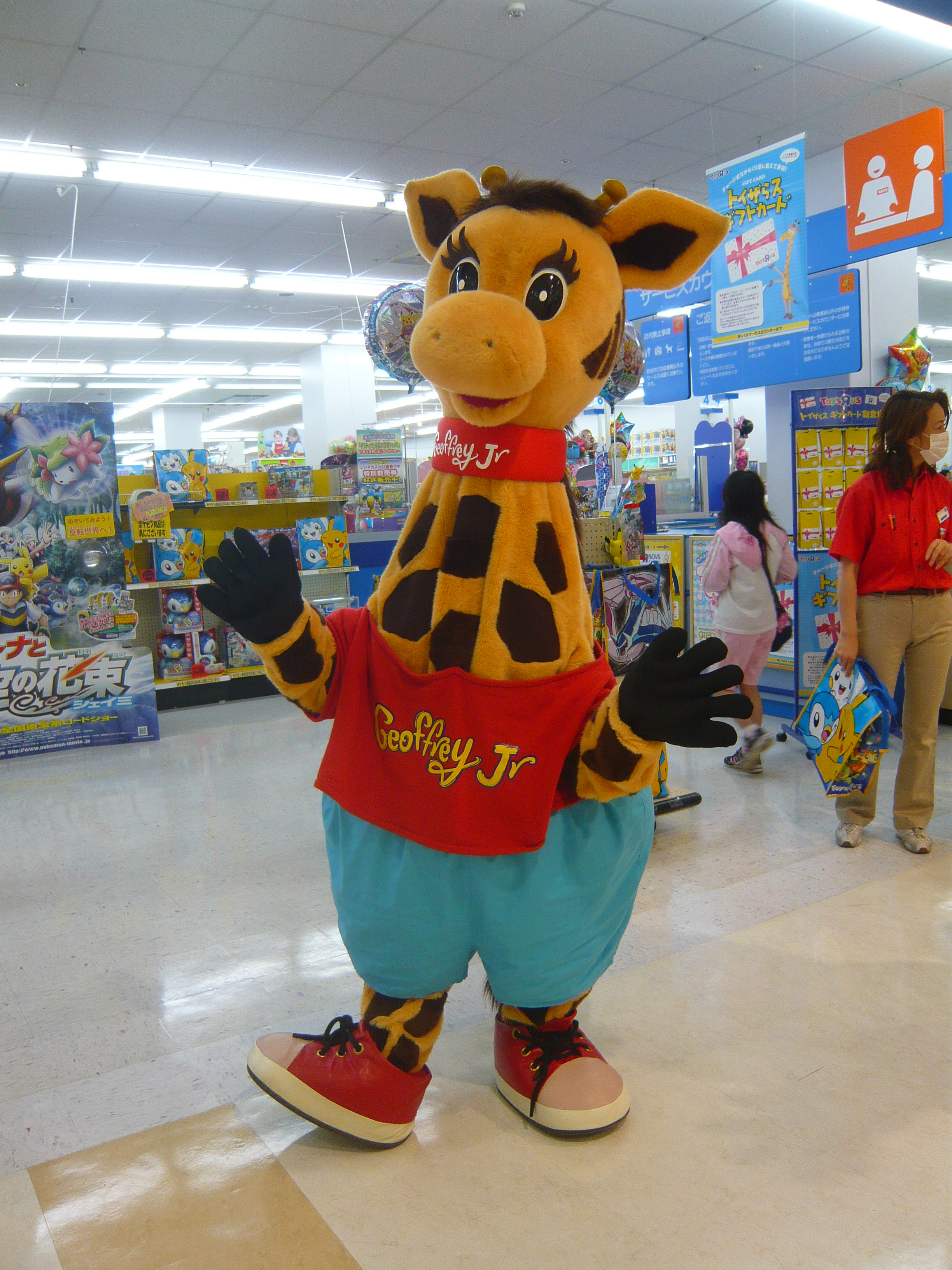 TOYSRUS Geoffrey Jr. トイザらスのマスコットキャラクター「ジェフリーJr.」,Gifu,Gifu,Japan（岐阜県岐阜市）のw:ja:マーサ21で撮影。